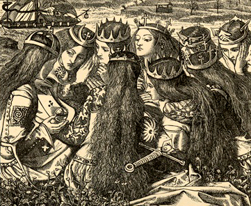 Fom Poems [The Moxon Tennyson] (1857).